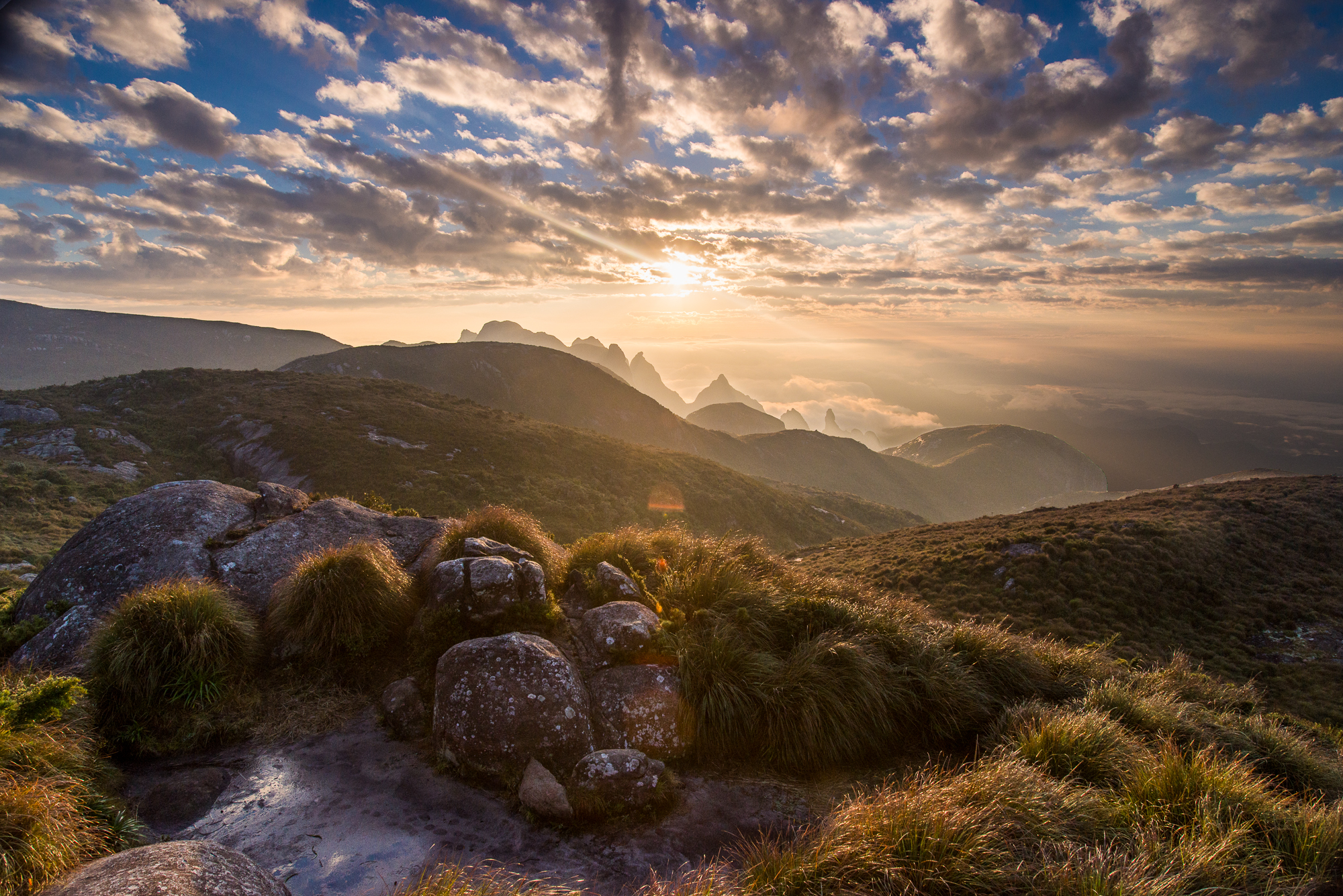 Amanhecer no Parque Nacional Serra dos Órgãos visto do Açú